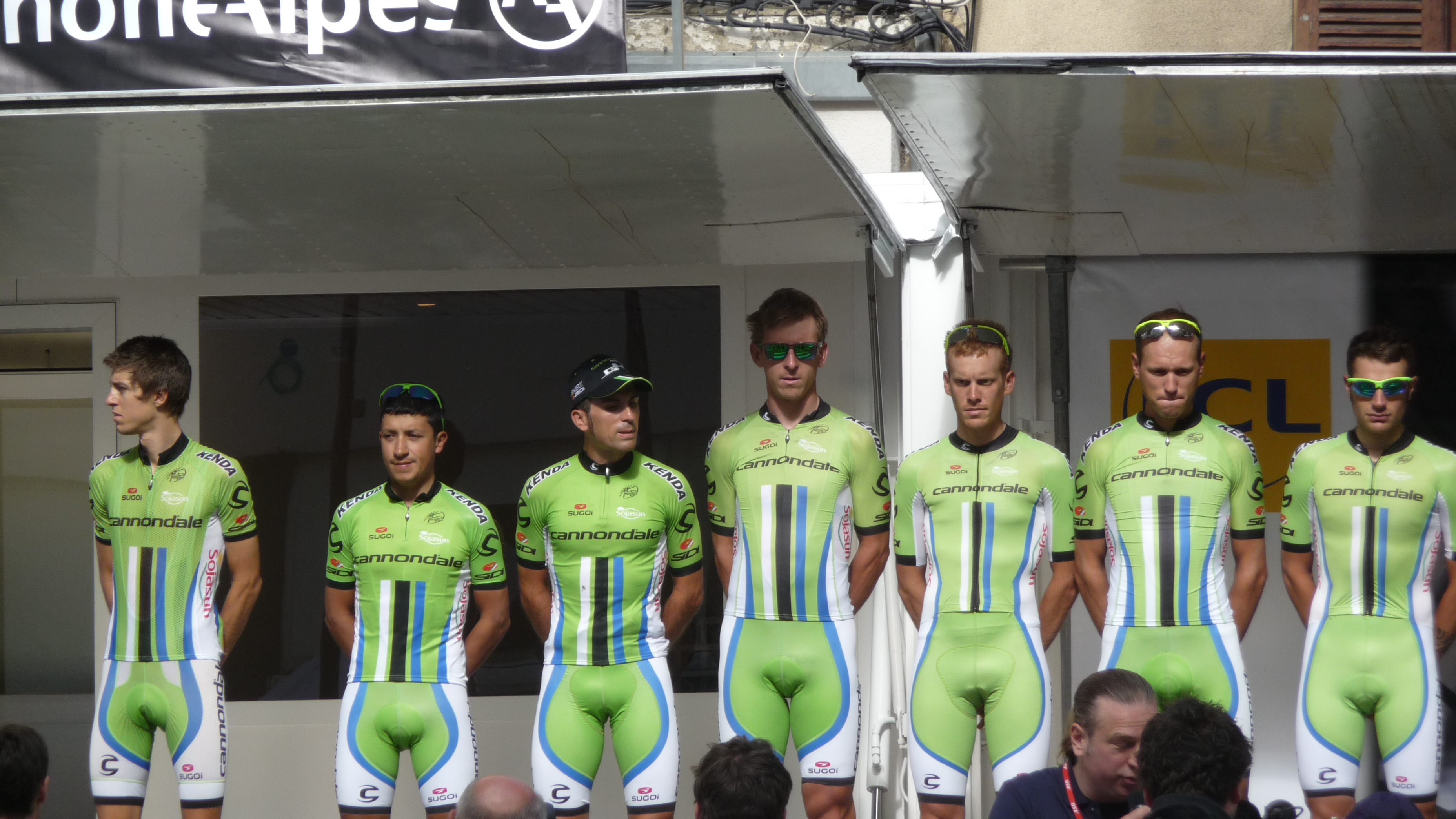 Présentation des équipes du Critérium du Dauphiné 2014 lors du départ de la 2ème étape à Tarare.